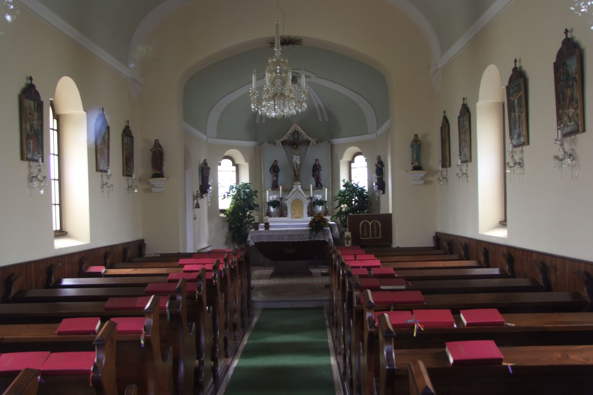 Kath. Filialkirche hll. Gertrud und Mechthild